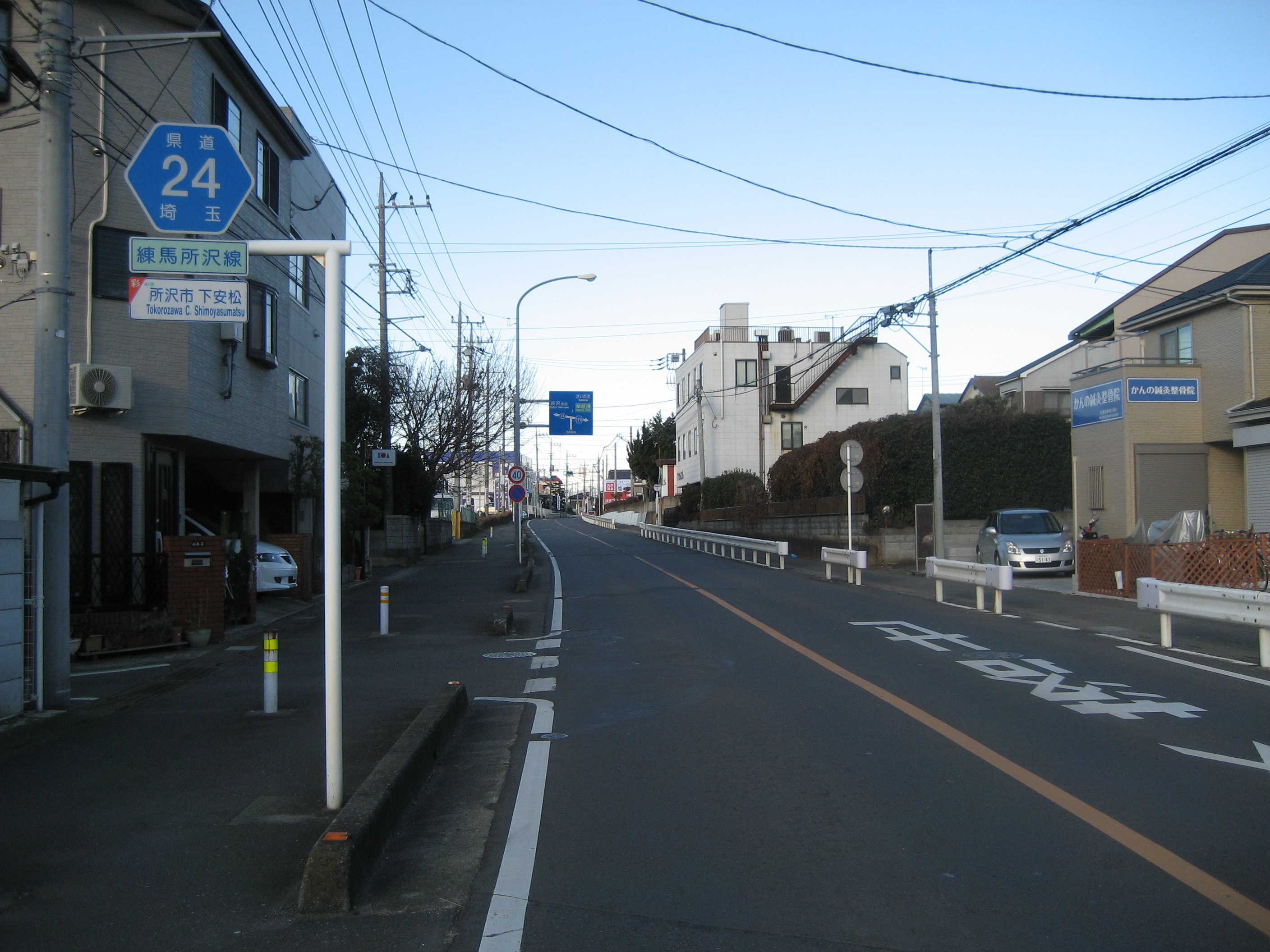 埼玉県道24号線所沢市下安松付近（所沢市街地方面を撮影）